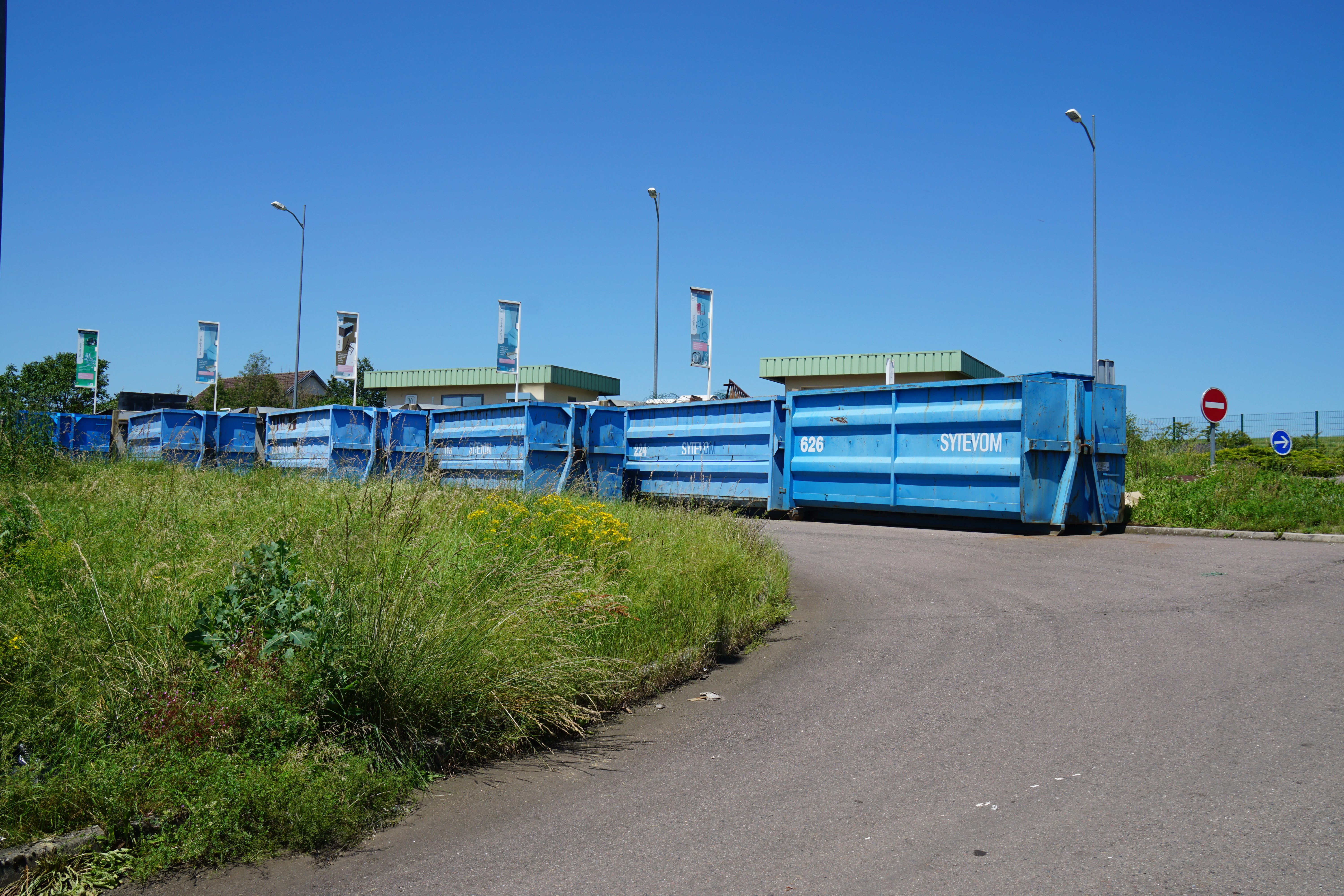 Déchetterie de Saulx (Haute-Saône).